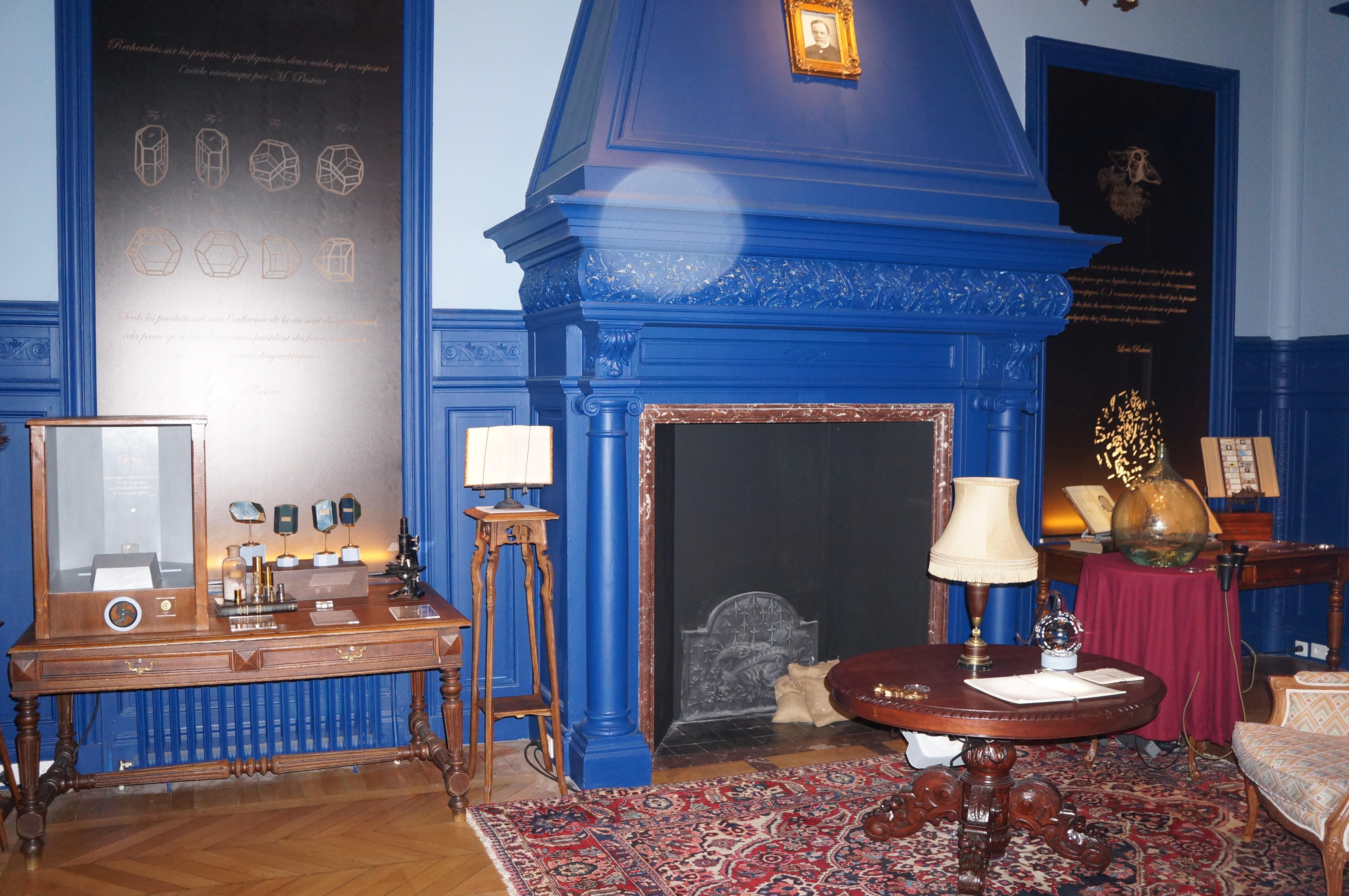 Le laboratoire de Louis Pasteur reconstitué dans le musée de l' l'Institut Pasteur de Lille dans le Nord Hauts-de-France.- France.